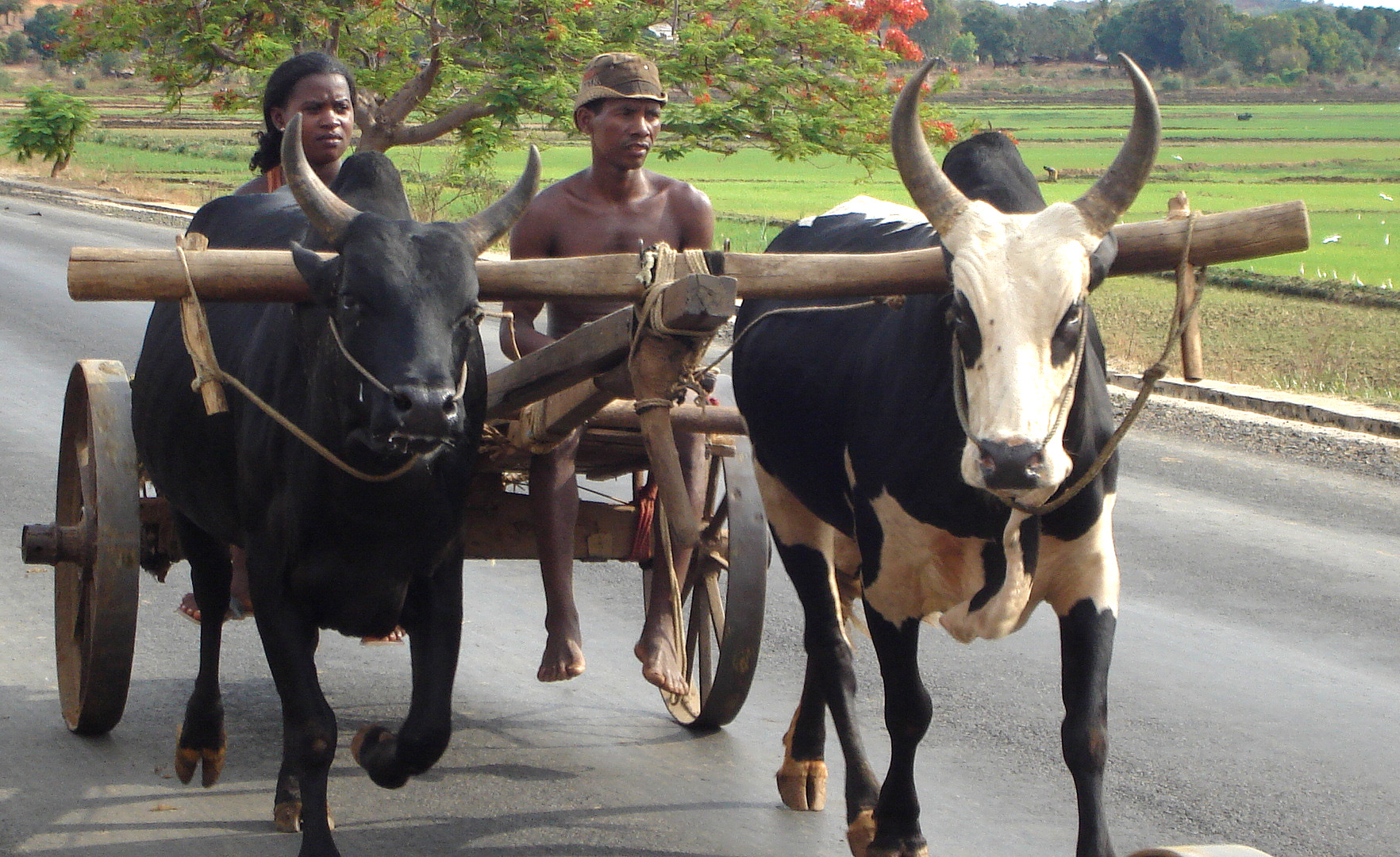 Zebu cattle cart